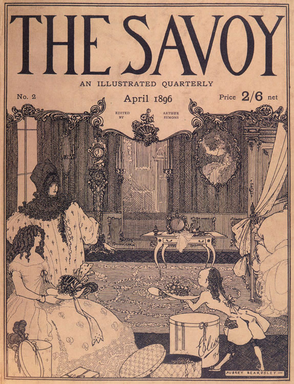 Couverture d'avril 1896 du magazine The Savoy